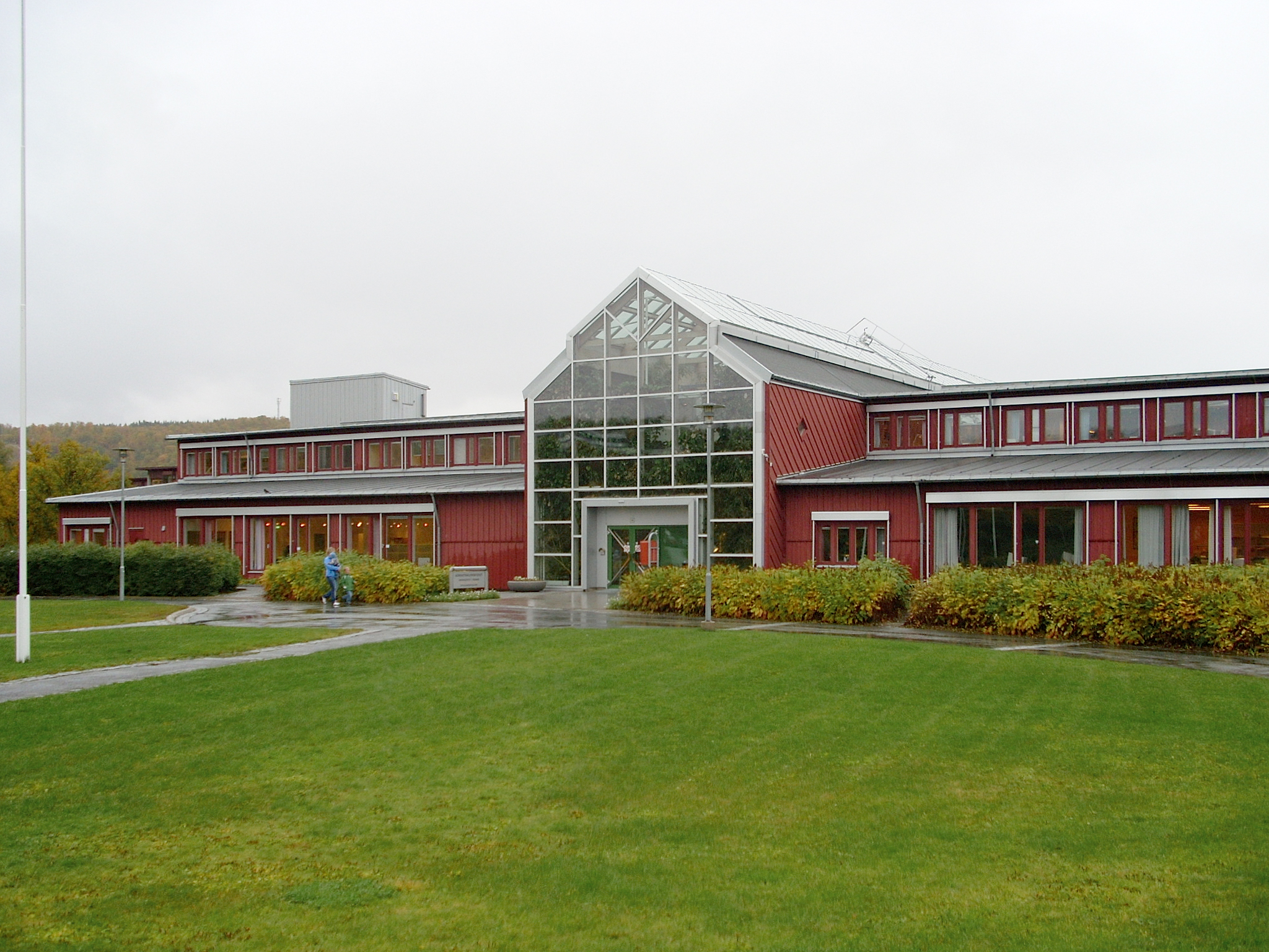 University of Tromsø, Sentraladministrasjonen (Administration building) seen from Hansine Hansens veg